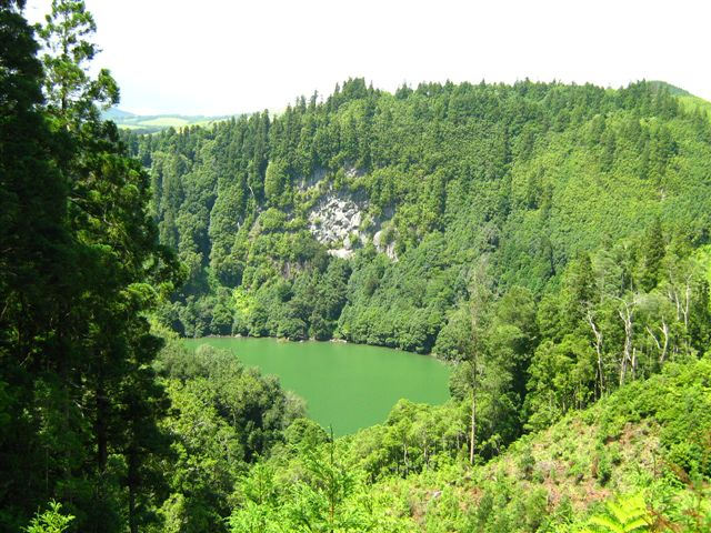 Lagoa do Congro, Ilha de São Miguel, Arquipélago dos, Açores, Portugal.